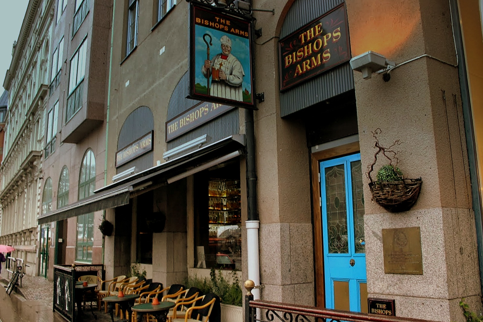 GREAT SELECTION OF BEER ON HAND PUMP AND TAP INCLUDING MANY SWEDISH MICRO BREWRIES!